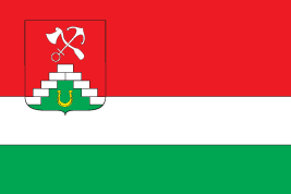 Прапор Амвросіївки